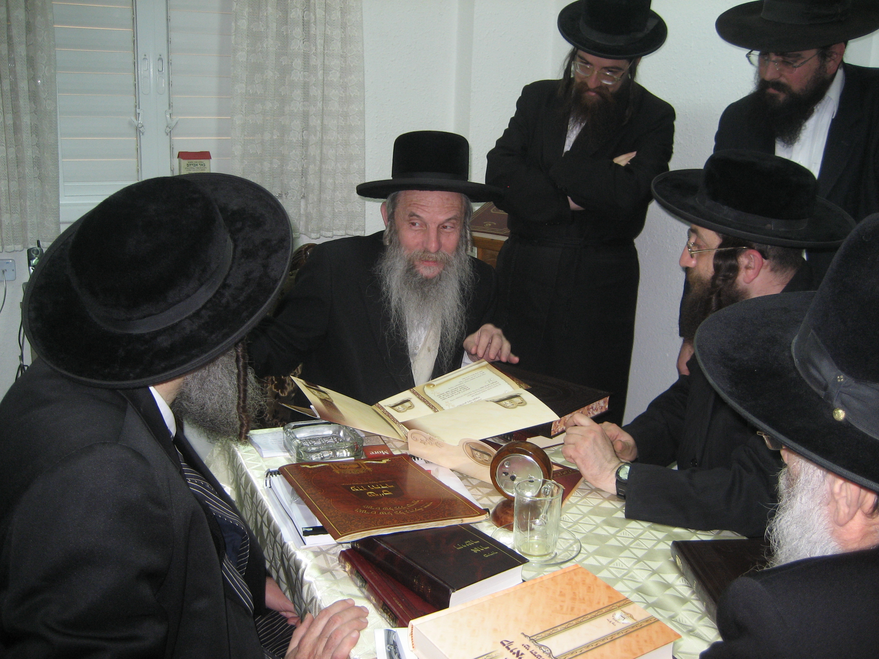 רבי אברהם וינברג - האדמו"ר מסלאנים